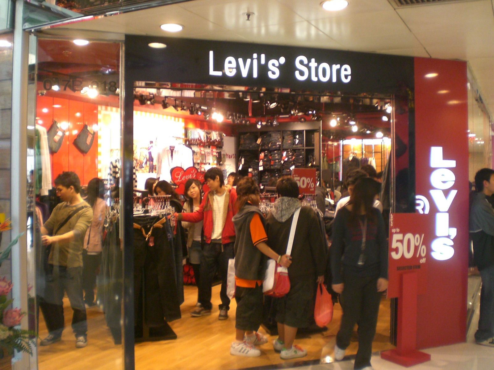 元朗區元朗新市鎮青山公路元朗段 元朗廣場 Levi Strauss & Co.